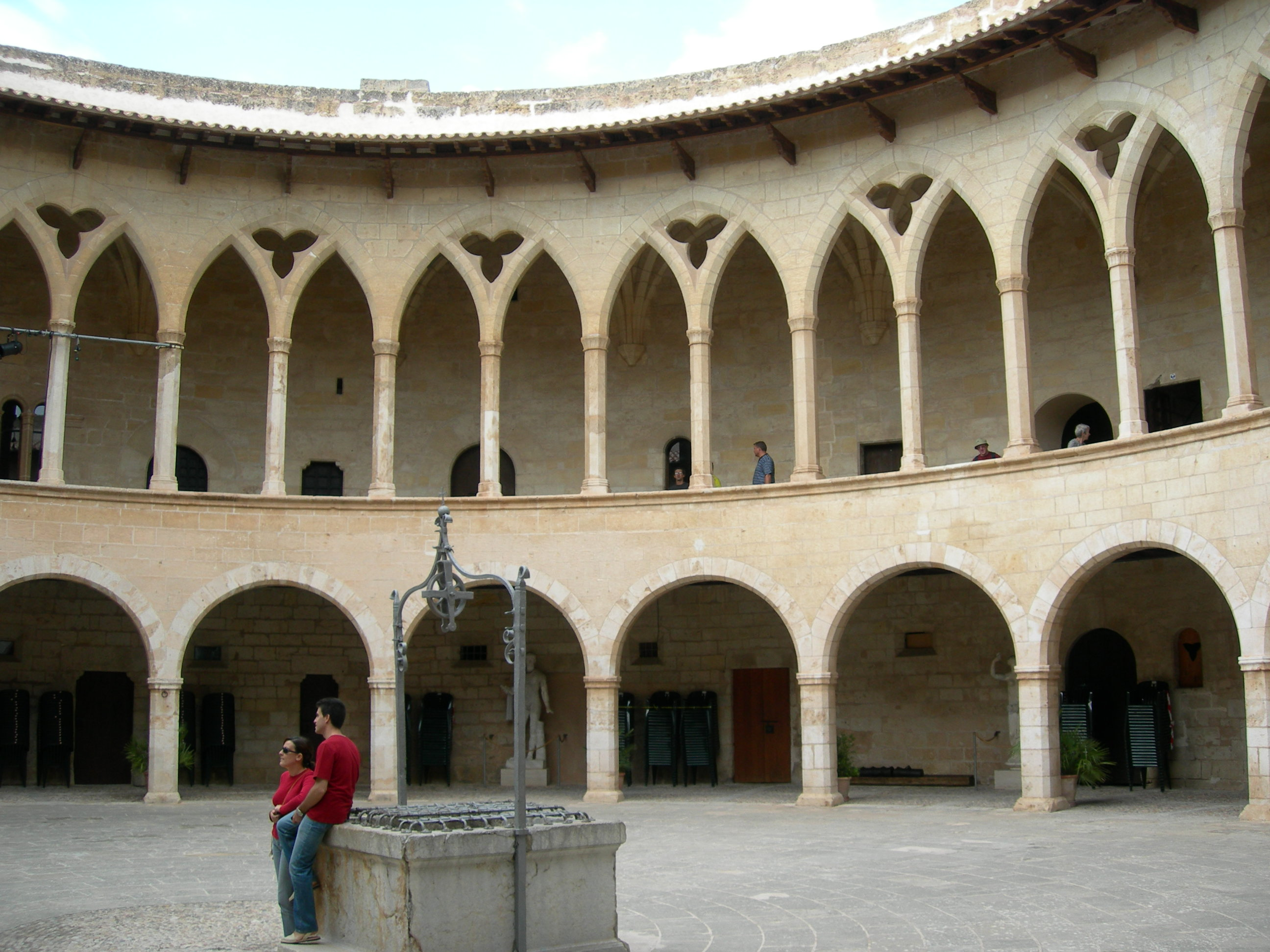 Bellver's interior.